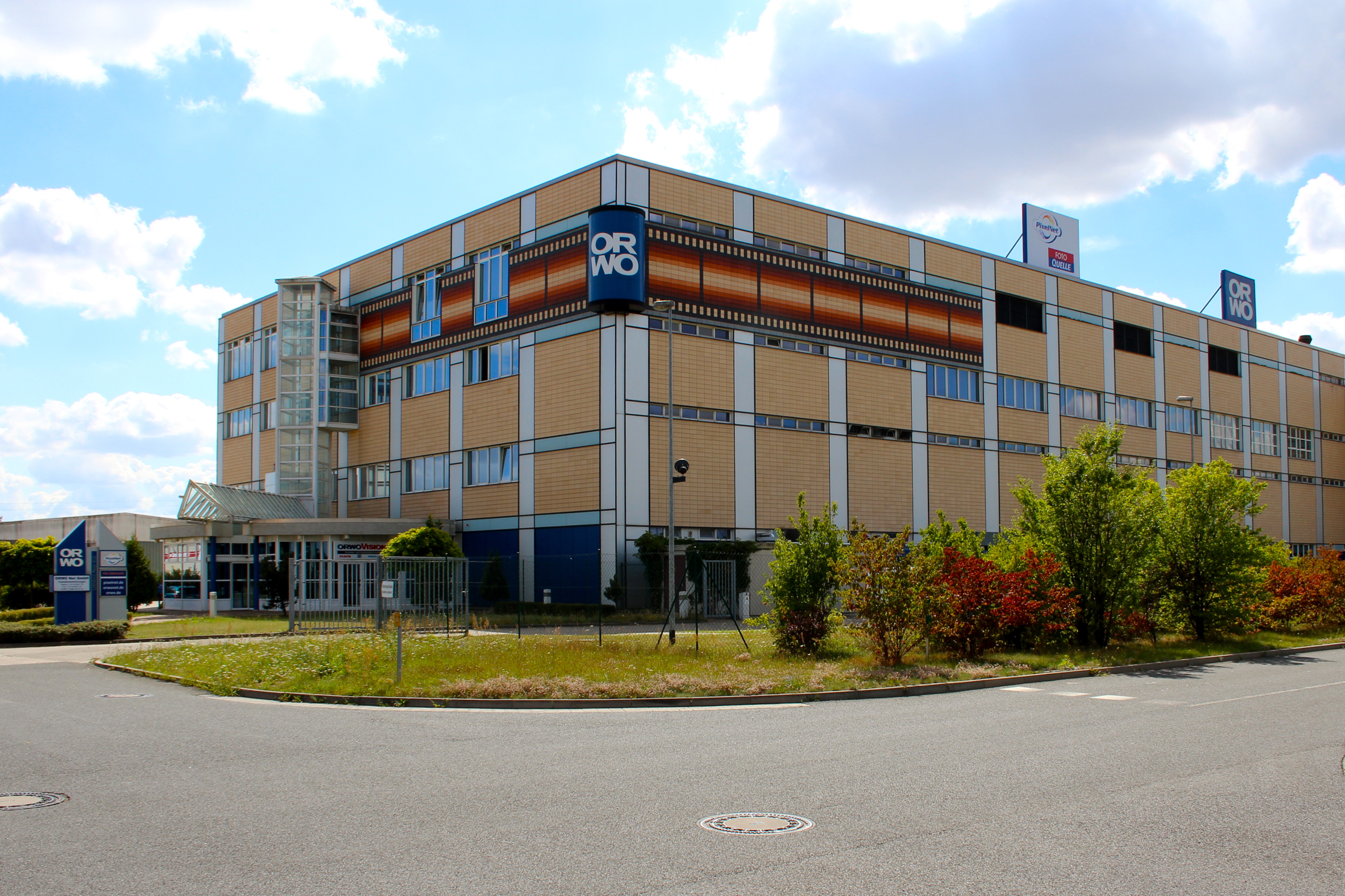 Filmfabrik Wolfen (ORWO)